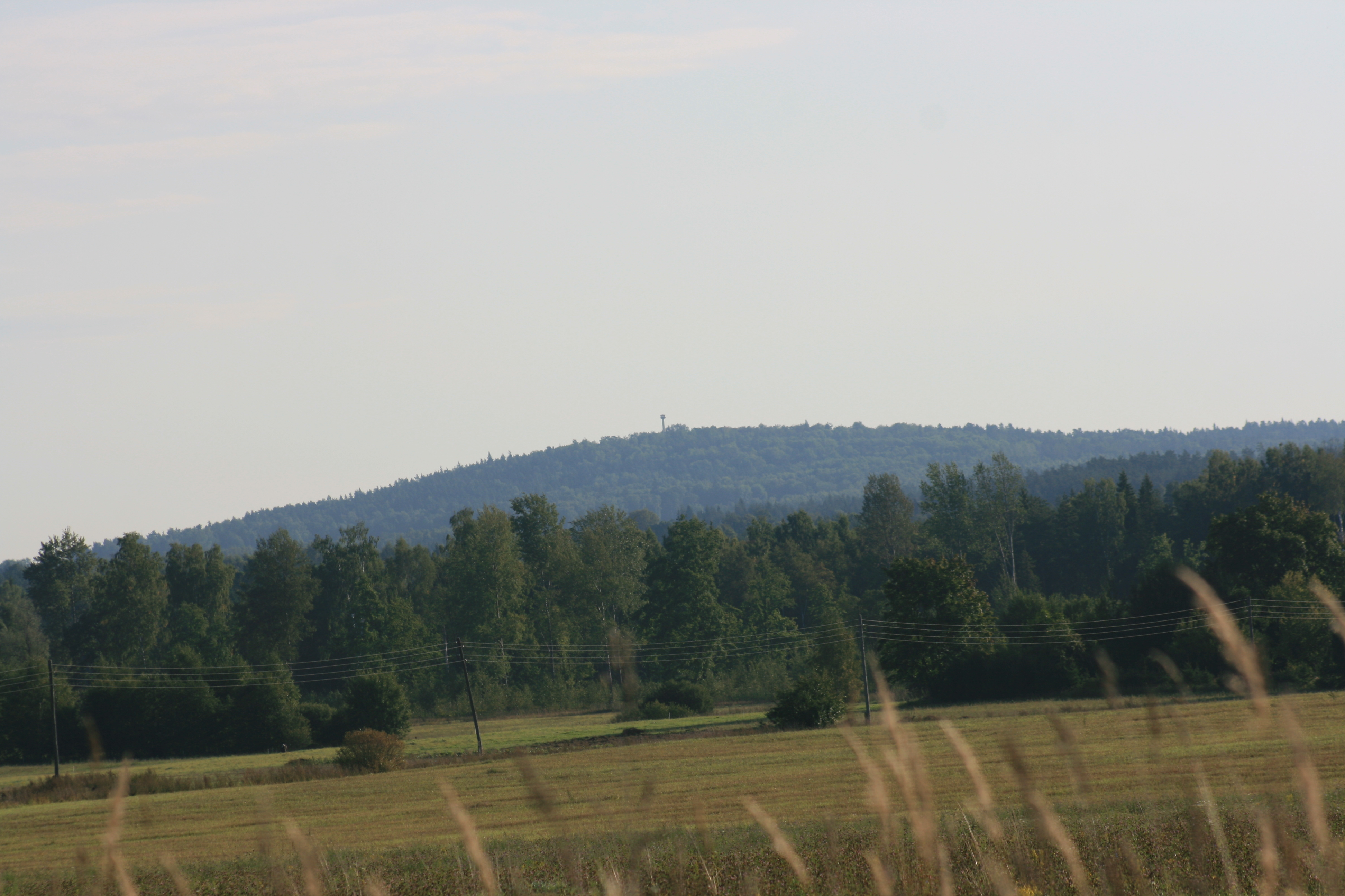 Zilaiskalns